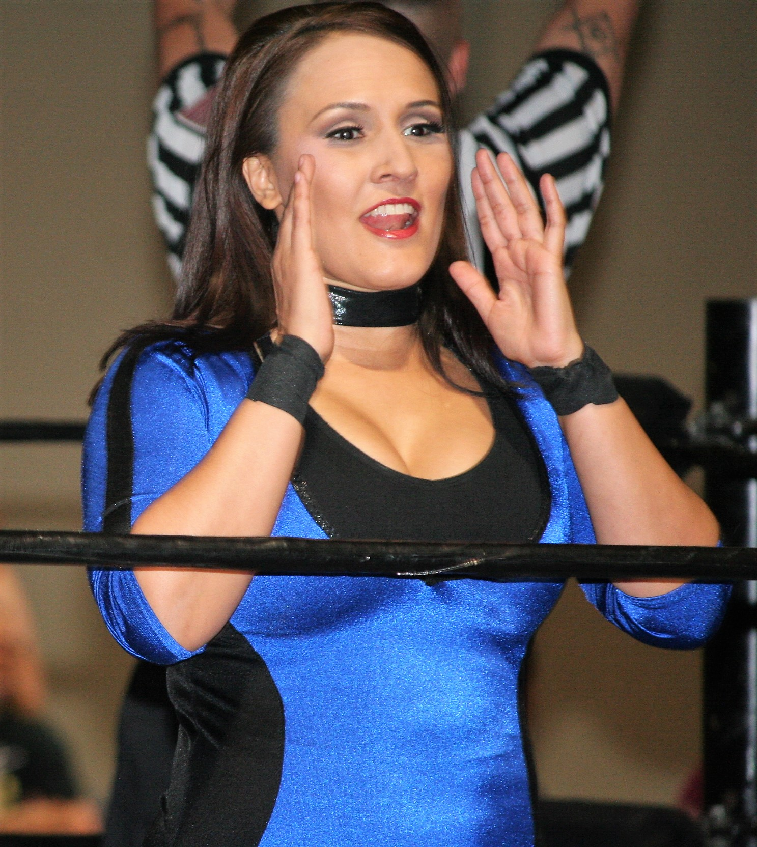 La catcheuse (lutteuse professionnelle) Cheerleader Melissa en 2017.